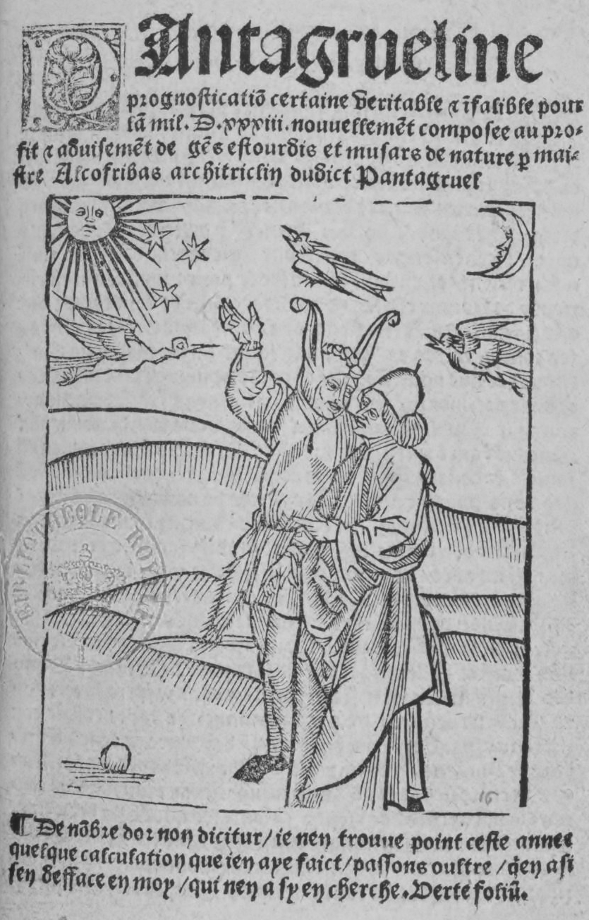 Page de titre de la Pantagrueline prognostication pour l'an 1533